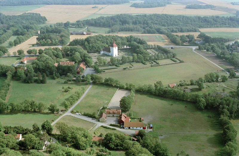 Vallda kyrka och kyrkby. Talrika boplatser från förhistorisk tid, öster och väster om kyrkan. Bilden är tagen mot (väderstreck): SO Motiv: Vallda Nyckelord: Flygbilder, Riksintressen Kategori: Boplats, KyrkomiljöVallda kyrka och kyrkby. Talrika boplatser från förhistorisk tid, öster och väster om kyrkan. Bilden är tagen mot (väderstreck): SO.